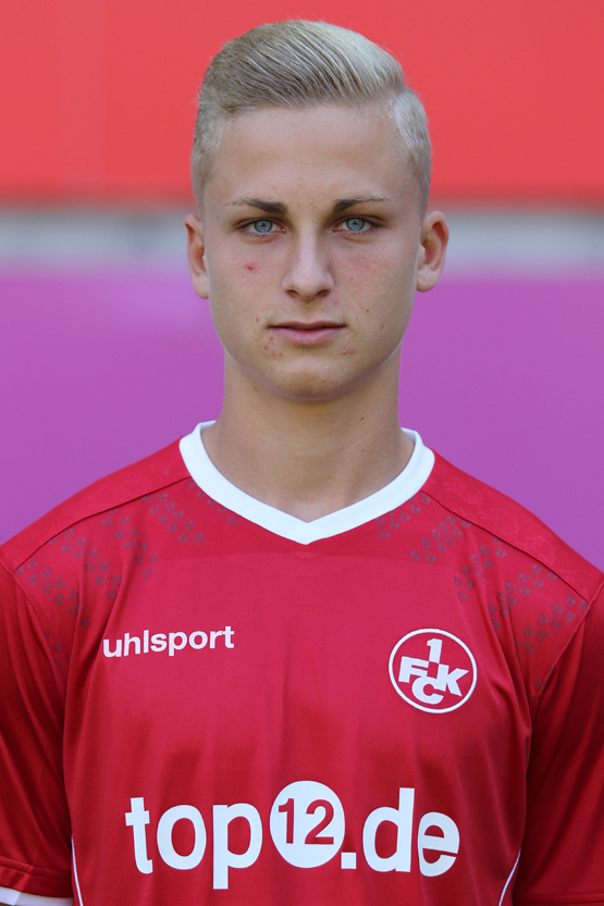 Nils Seufert